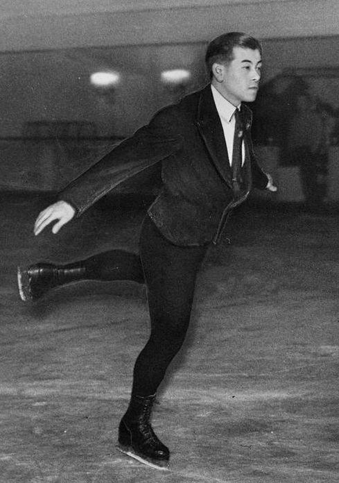 Figure skater Toshiichi Katayama, or Toshikazu Katayama in action, circa 1935.